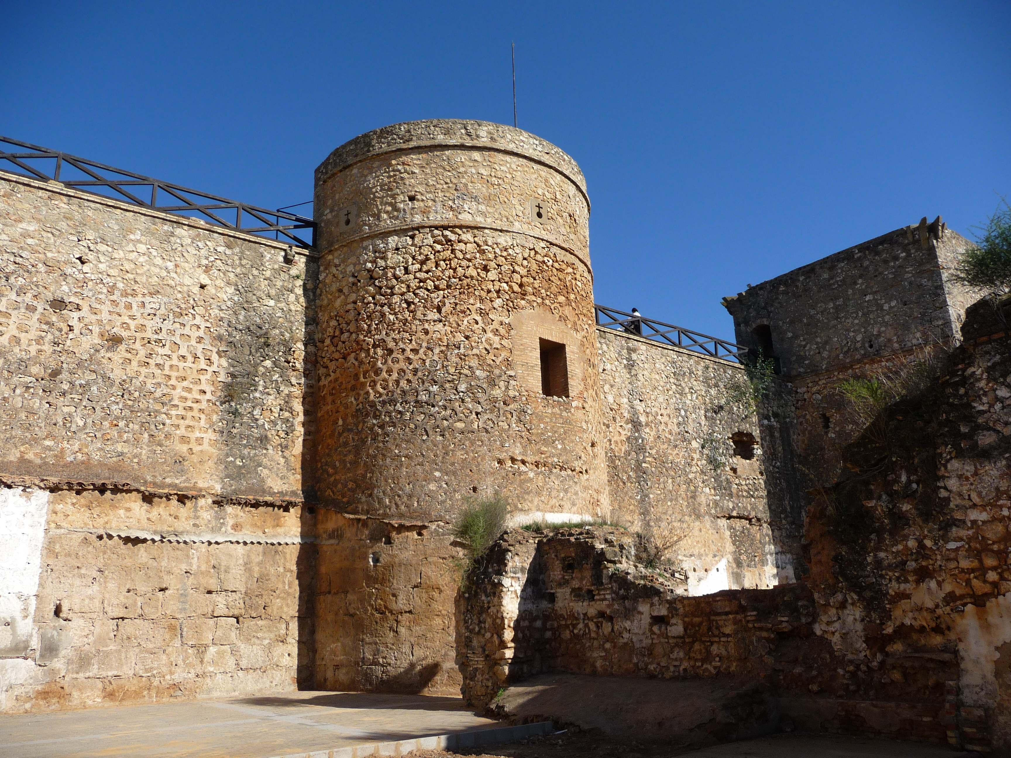 Murallas árabes de Niebla. Niebla, provincia de Huelva (España)